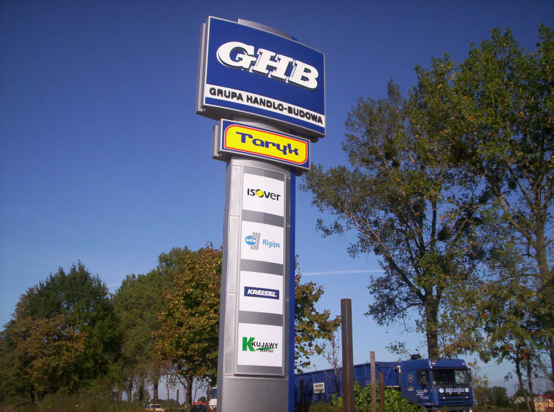 Pylon z Logiem GHB dla TARYK